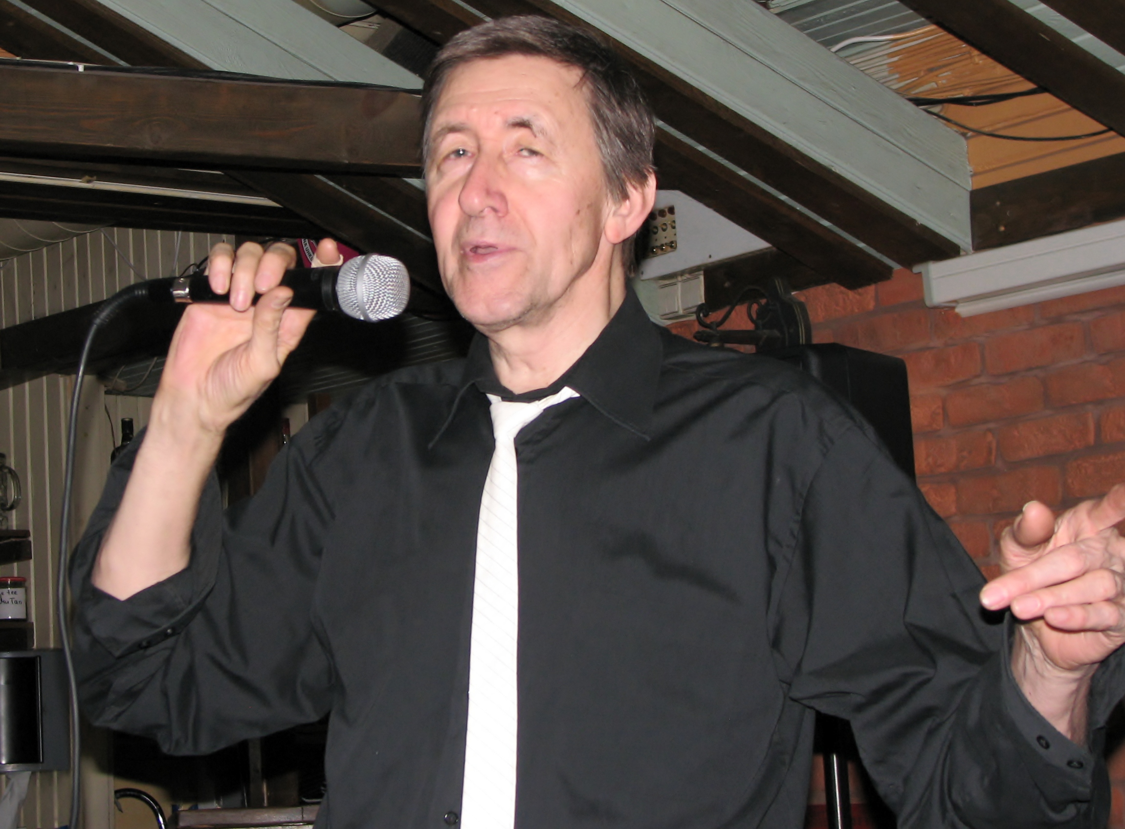 Boris Lehtlaan esinemas Rahumäel asuvas Alfredi pubis